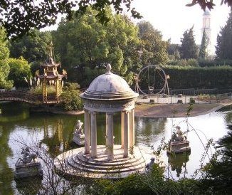 Particolare del parco di Villa Durazzo-Pallavicini, a Pegli (quartiere di Genova) (Italia)